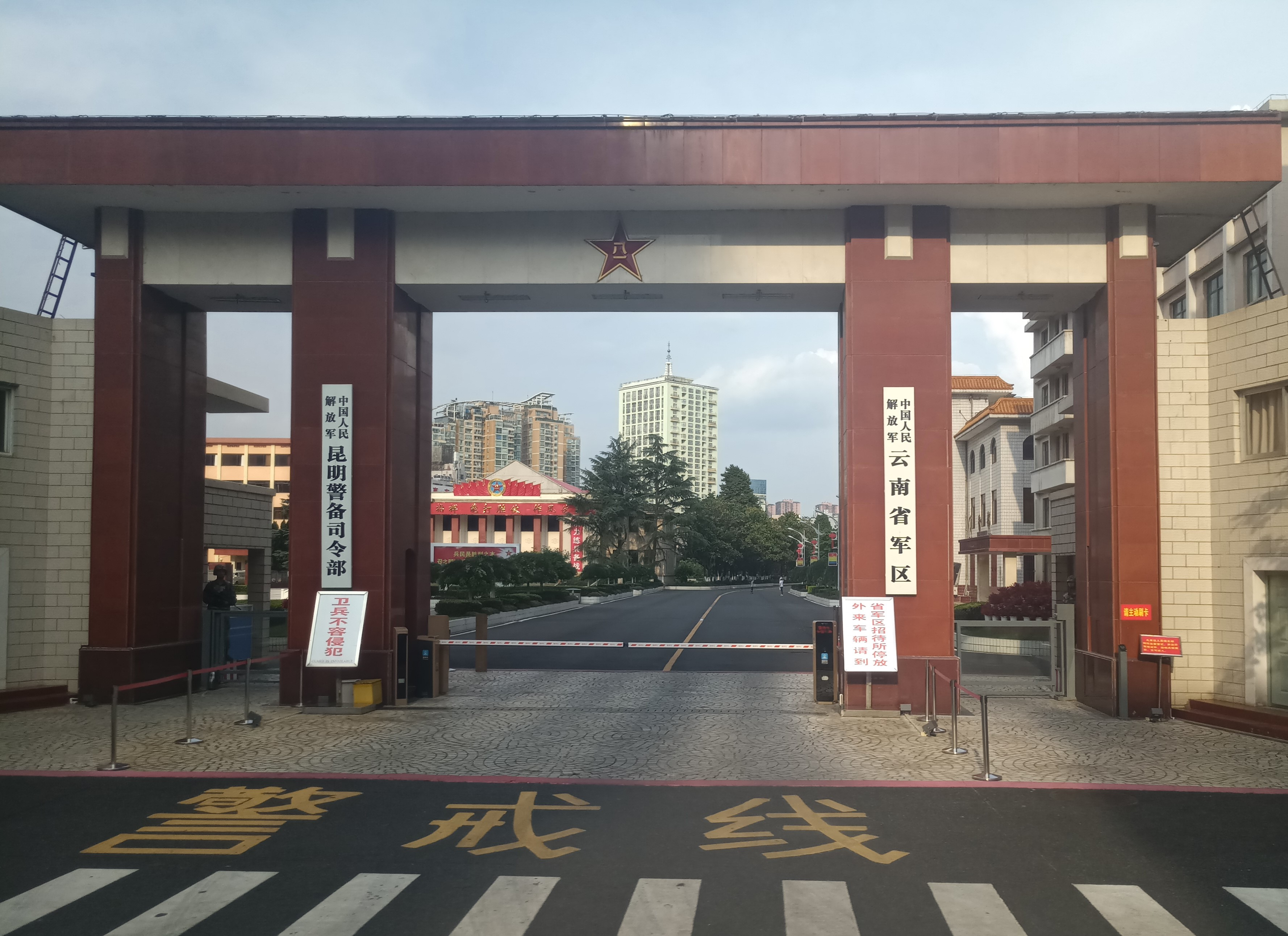 中文（中国大陆）: 云南省军区